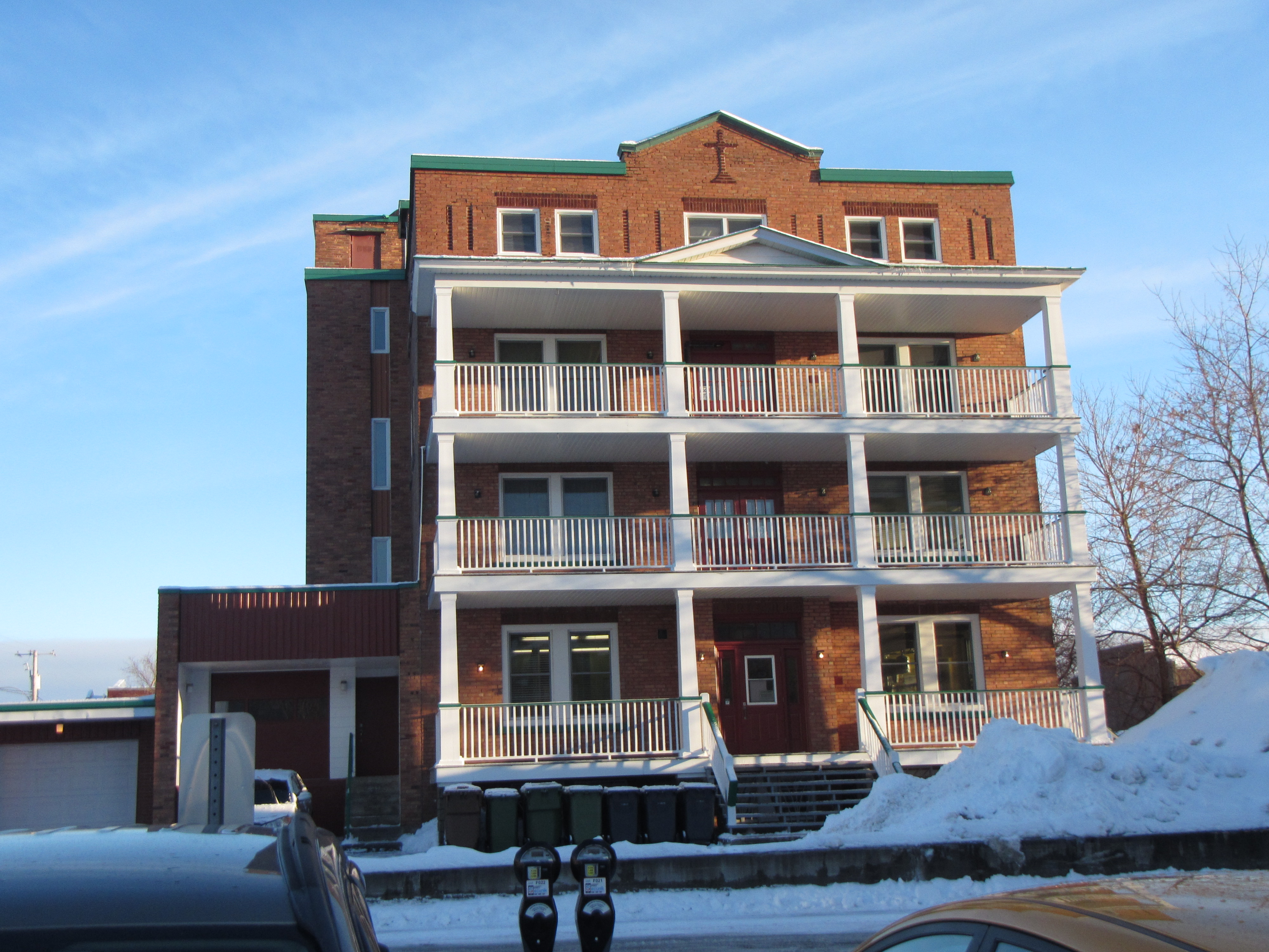 Ancien hôpital Sainte-Croix au 255 rue Brock, à Drummondville, Québec.